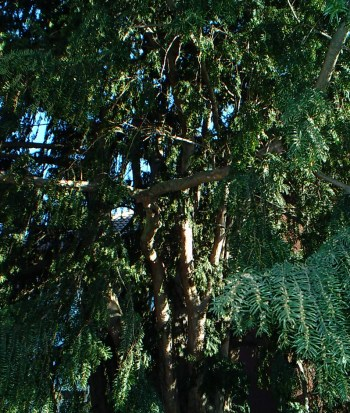 Taxus baccata var. dovastoniana